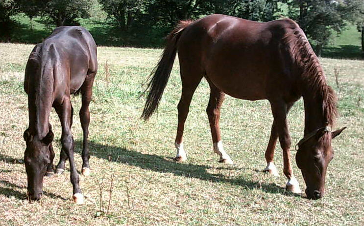 Württemberger Stute mit Fohlen, selbst fotografiert, 2005